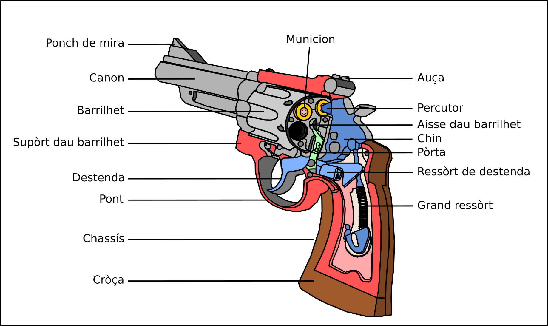 Esquèma generau d'un revòuver.